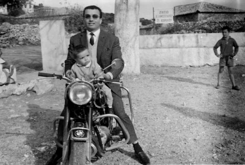 1968.. Δίκυκλο μοναδικό ΙΧ των δασκάλων